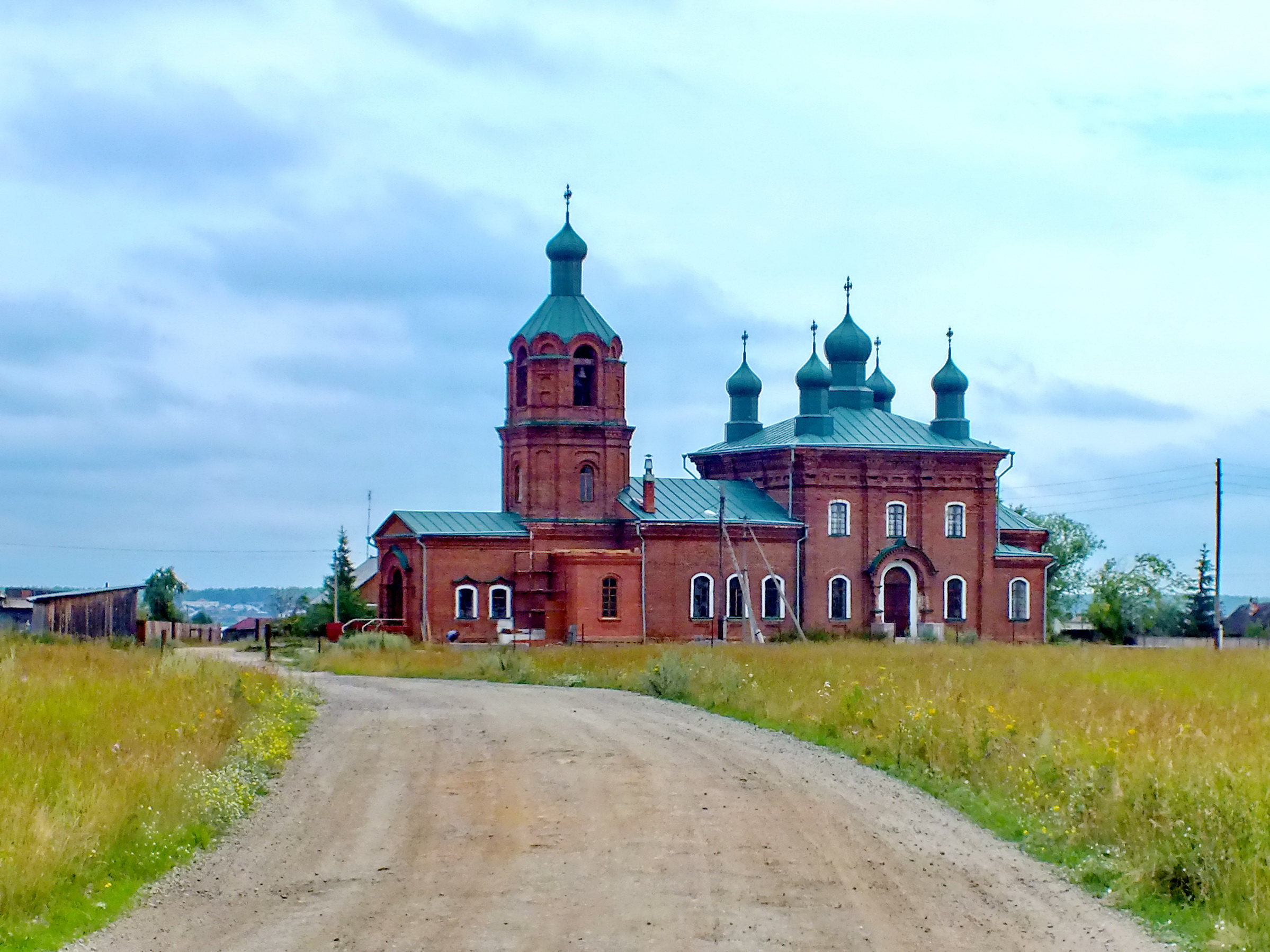 Церковь Илии Пророка: с. Клеопино, Каслинский район, Челябинская область